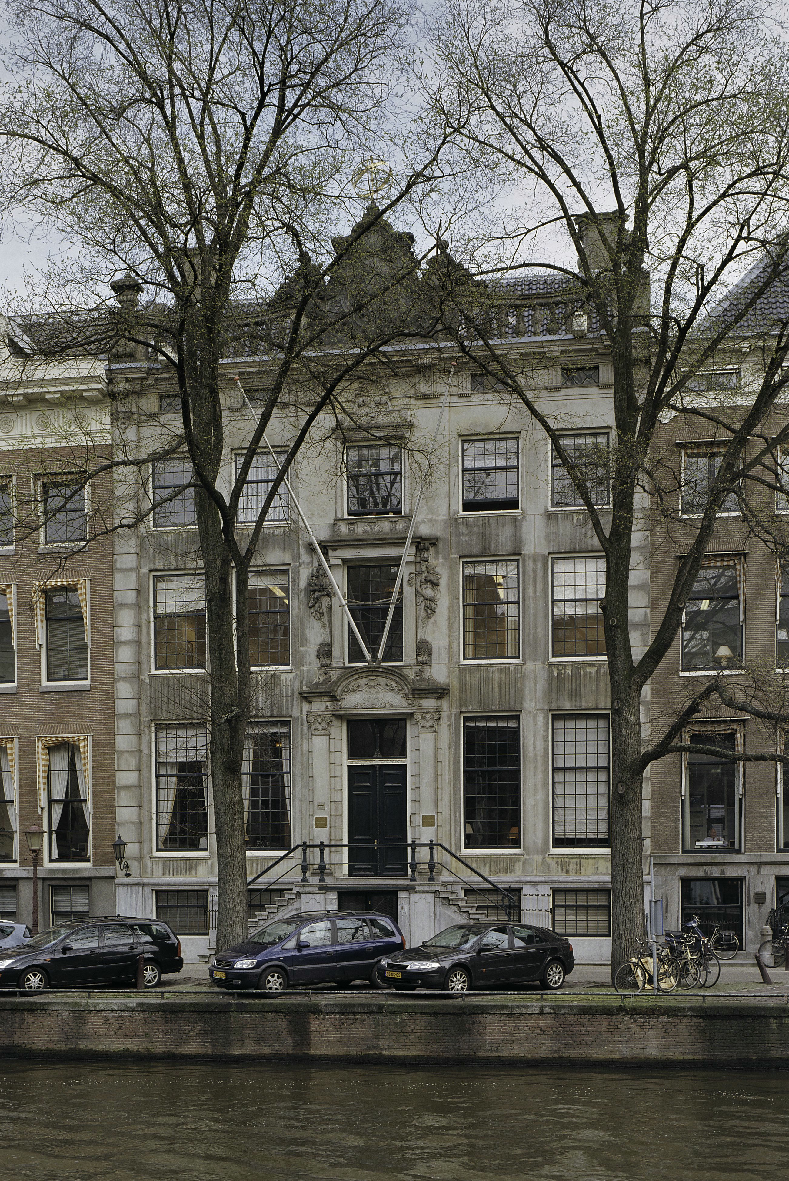 Centrum/ Voorgevel: Overzicht zandstenen voorgevel gezien vanaf overzijde (opmerking: Gefotografeerd voor Monumenten In Nederland Noord-Holland)